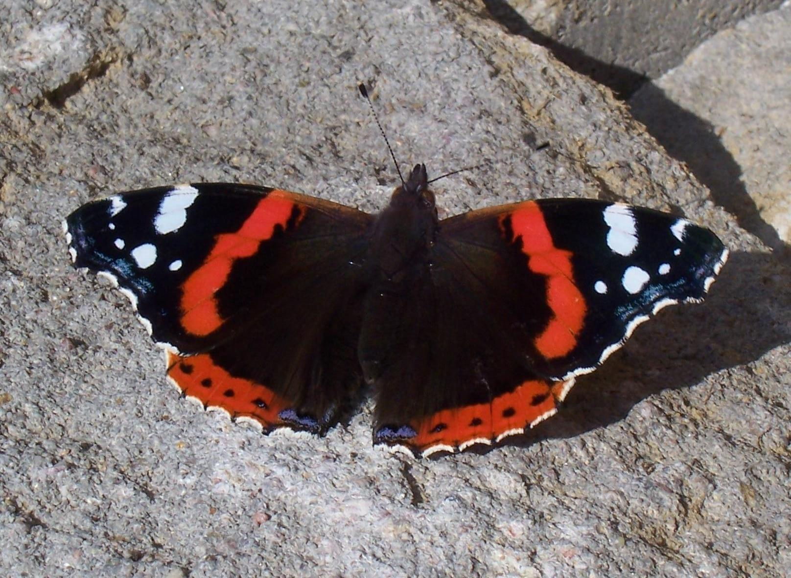 Vanessa atalanta / Admiralfalter mit geöffneten Flügeln